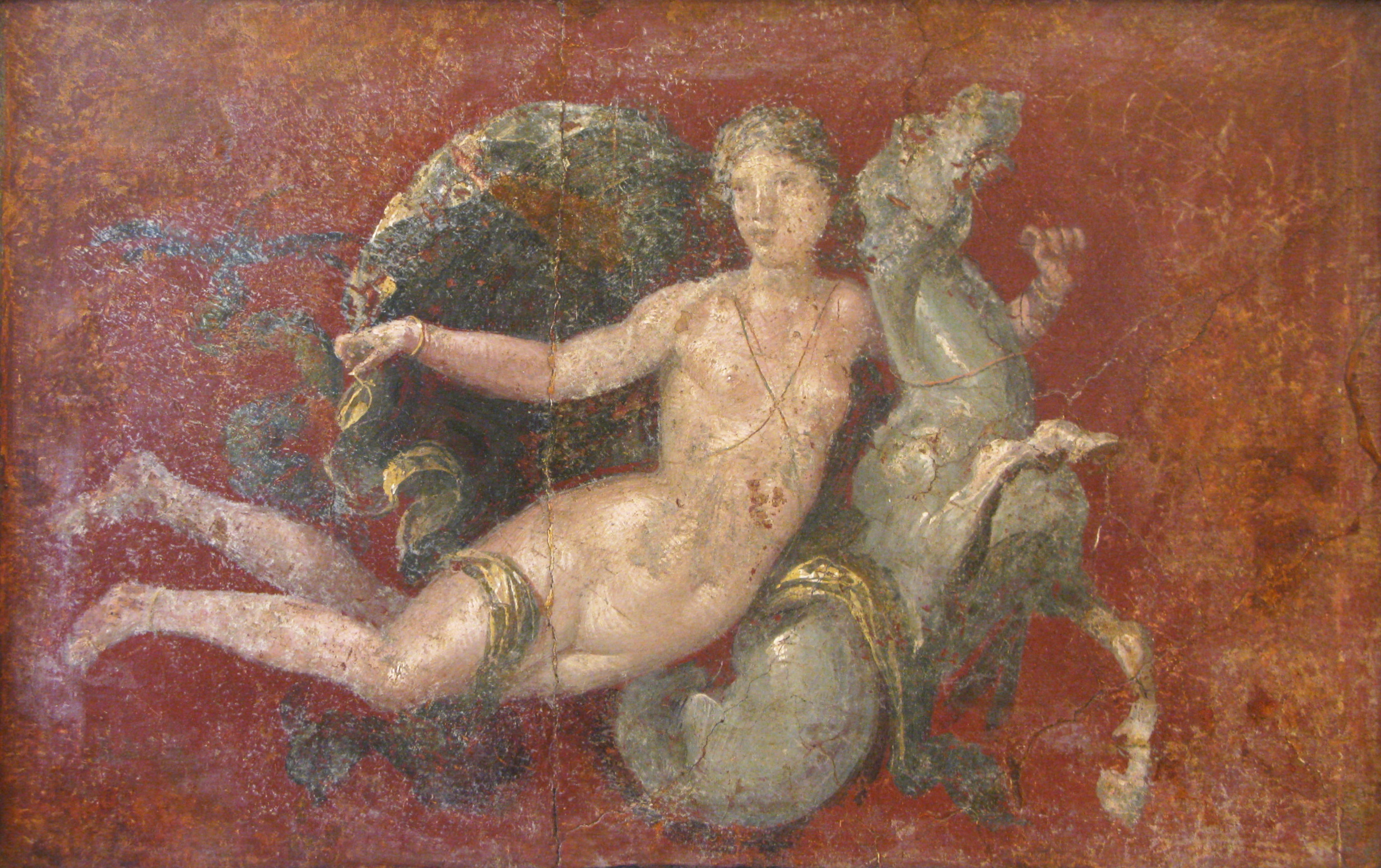 Nereide su cavallo marino, Museo archeologico nazionale di Napoli (inv. nr. 8859), da Stabiae, Villa di Arianna, anticamera.